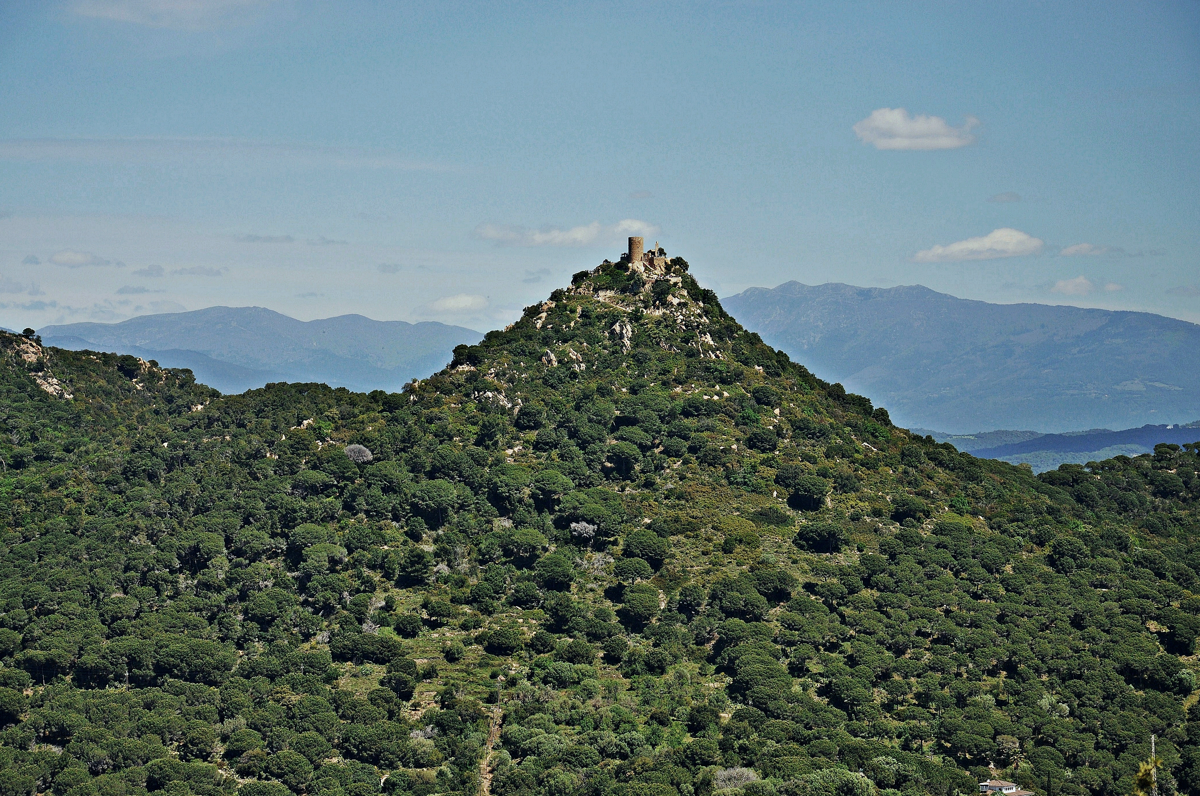 panoramica de burriac-maresme-cataluña